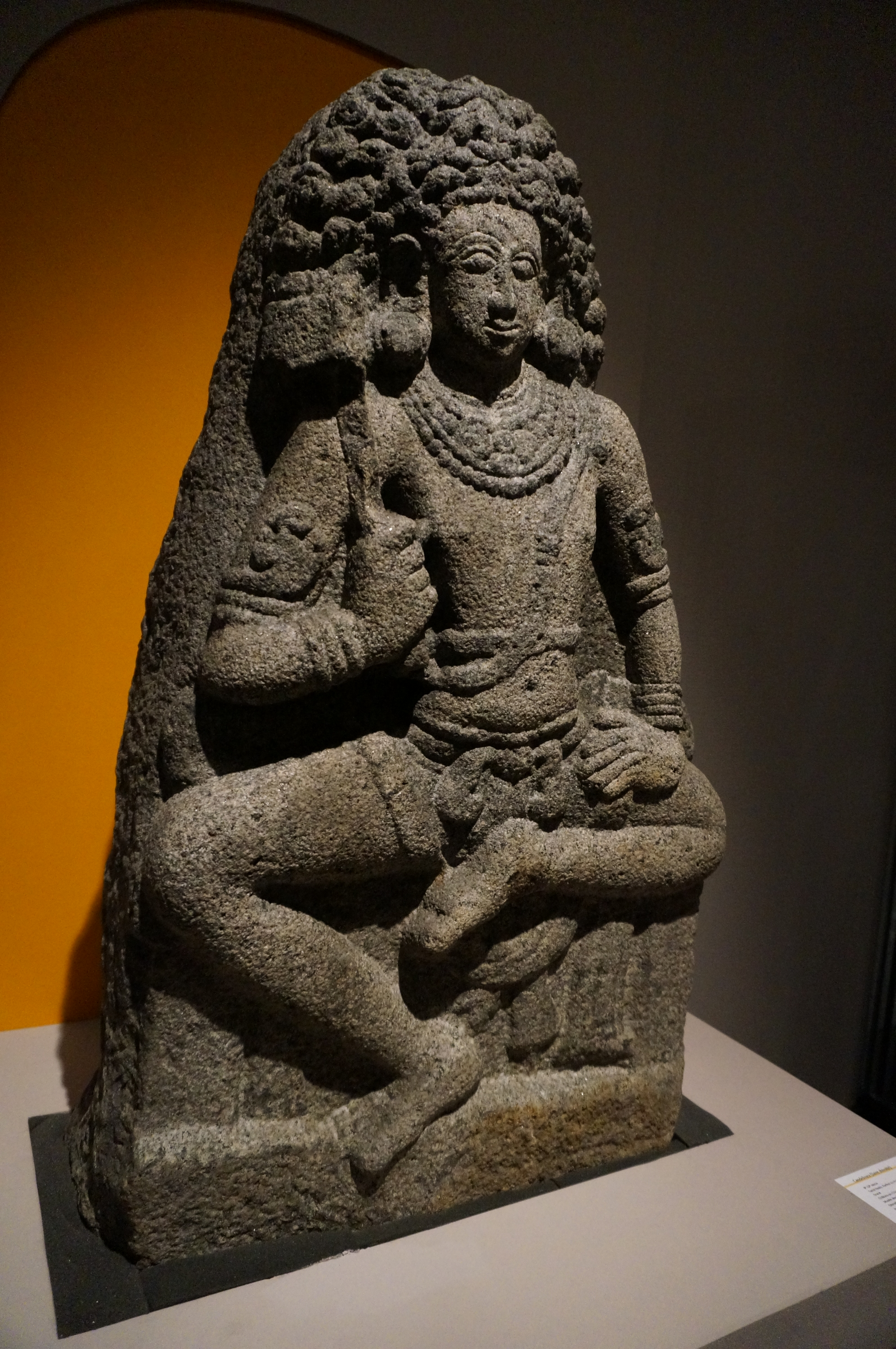 Vue de Candesvara, héro hindou du Tamil Nadu . Entre le IXe et le XIIe siècle